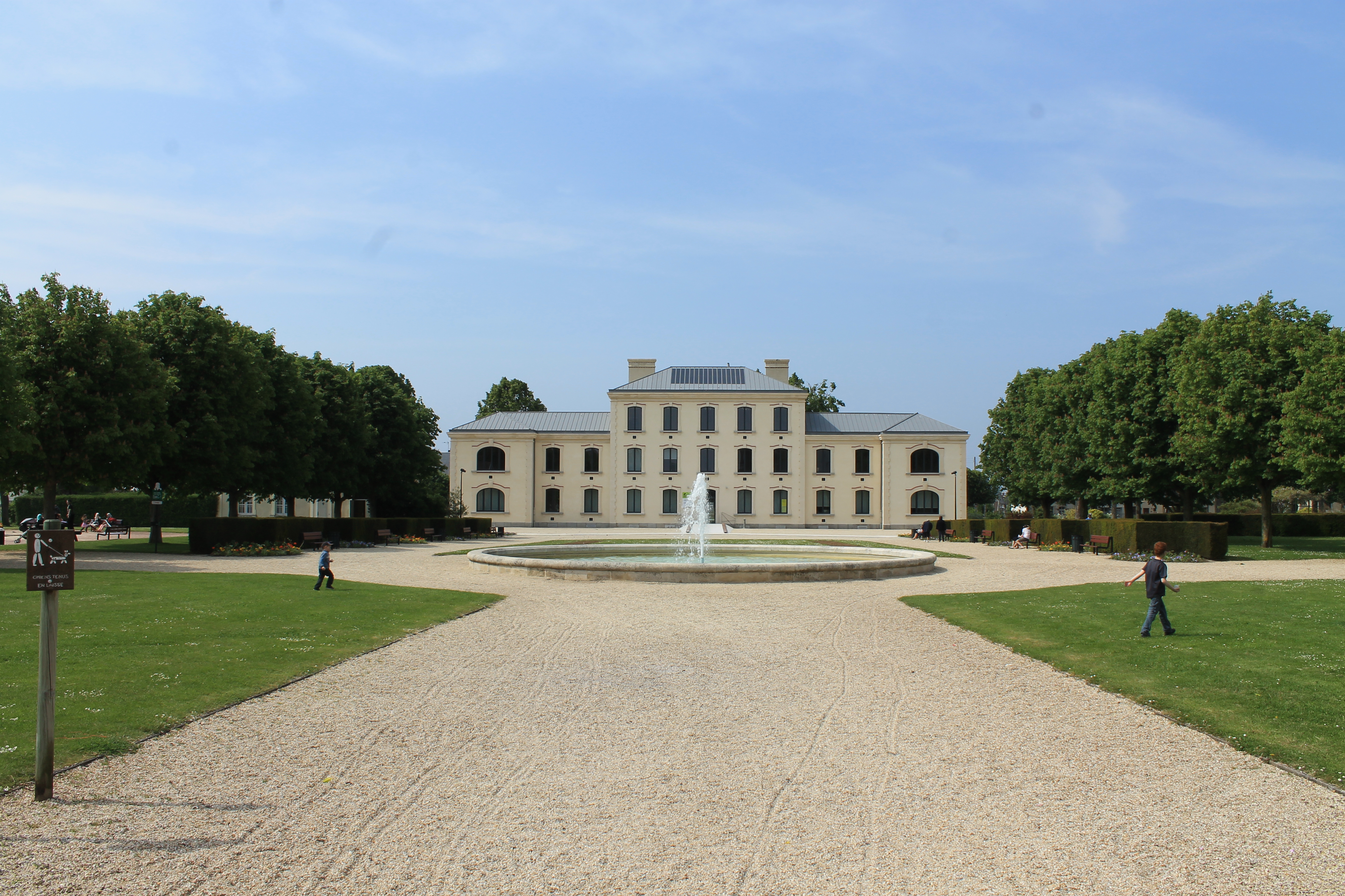 Jardin public Claude Decaen à Caen (Calvados)